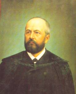 Szeremlei Császár Sámuel (1837–1924) református lelkész. A Magyar Tudományos Akadémia levelező tagja.